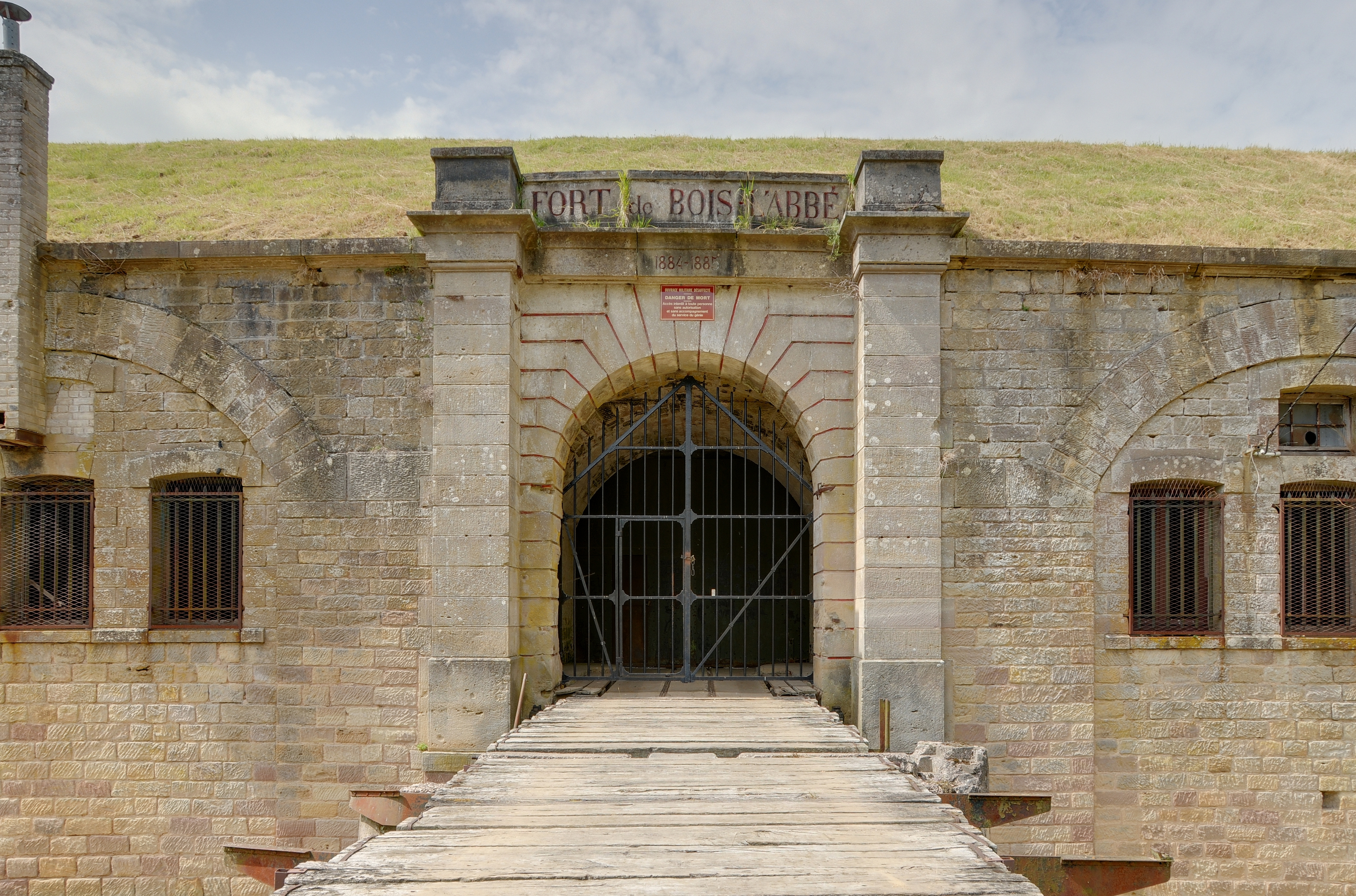 Entrée principale (HDR).